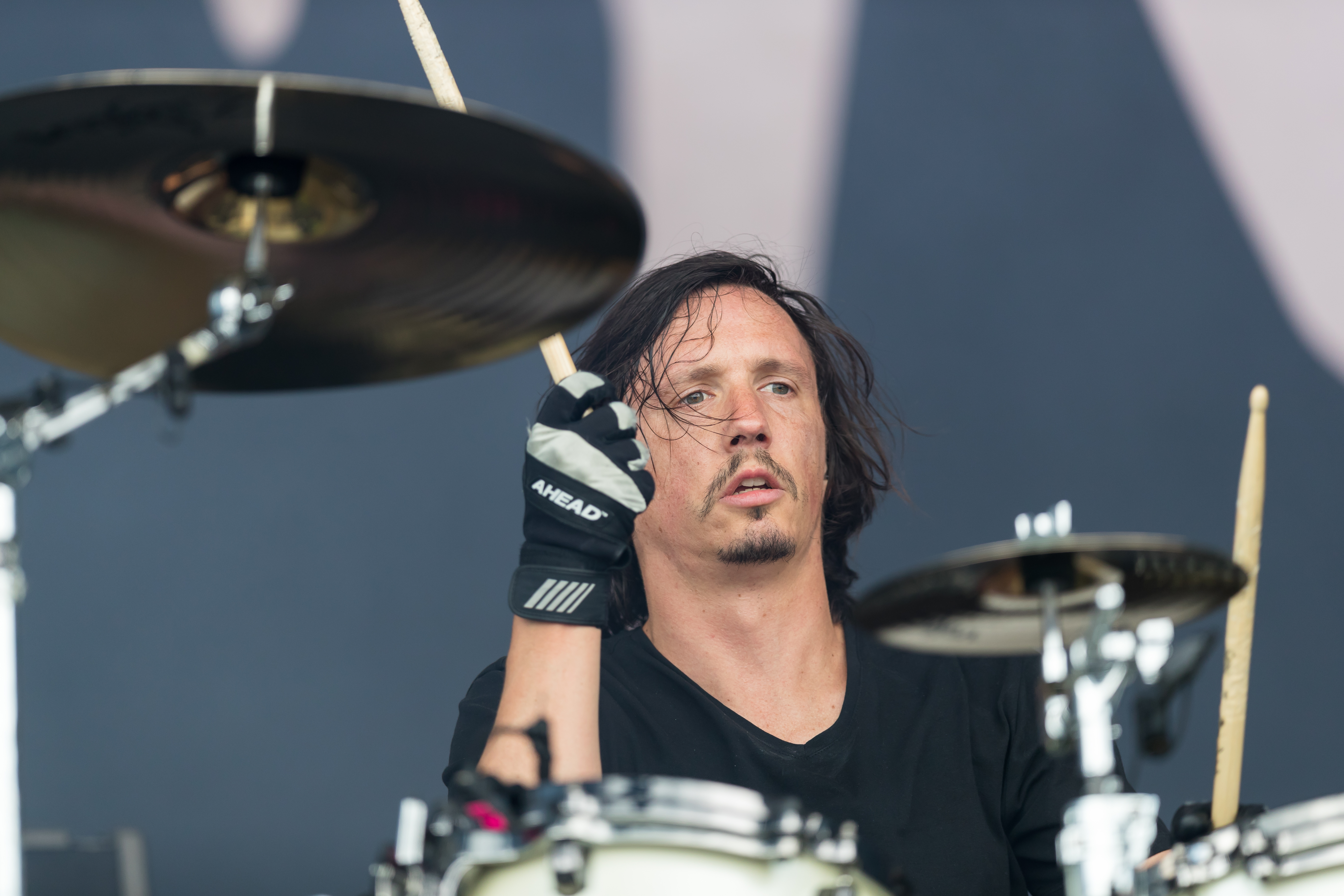 Gojira during Rock am Ring at Nürburgring, Nürburg, Rheinland Pfalz, Germany on 2017-06-04, Photo: Sven Mandel